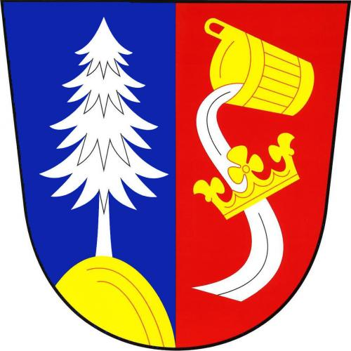 znak, Vysočany, okres Znojmo